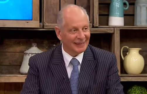 La fotografía en primer plano de un político uruguayo.